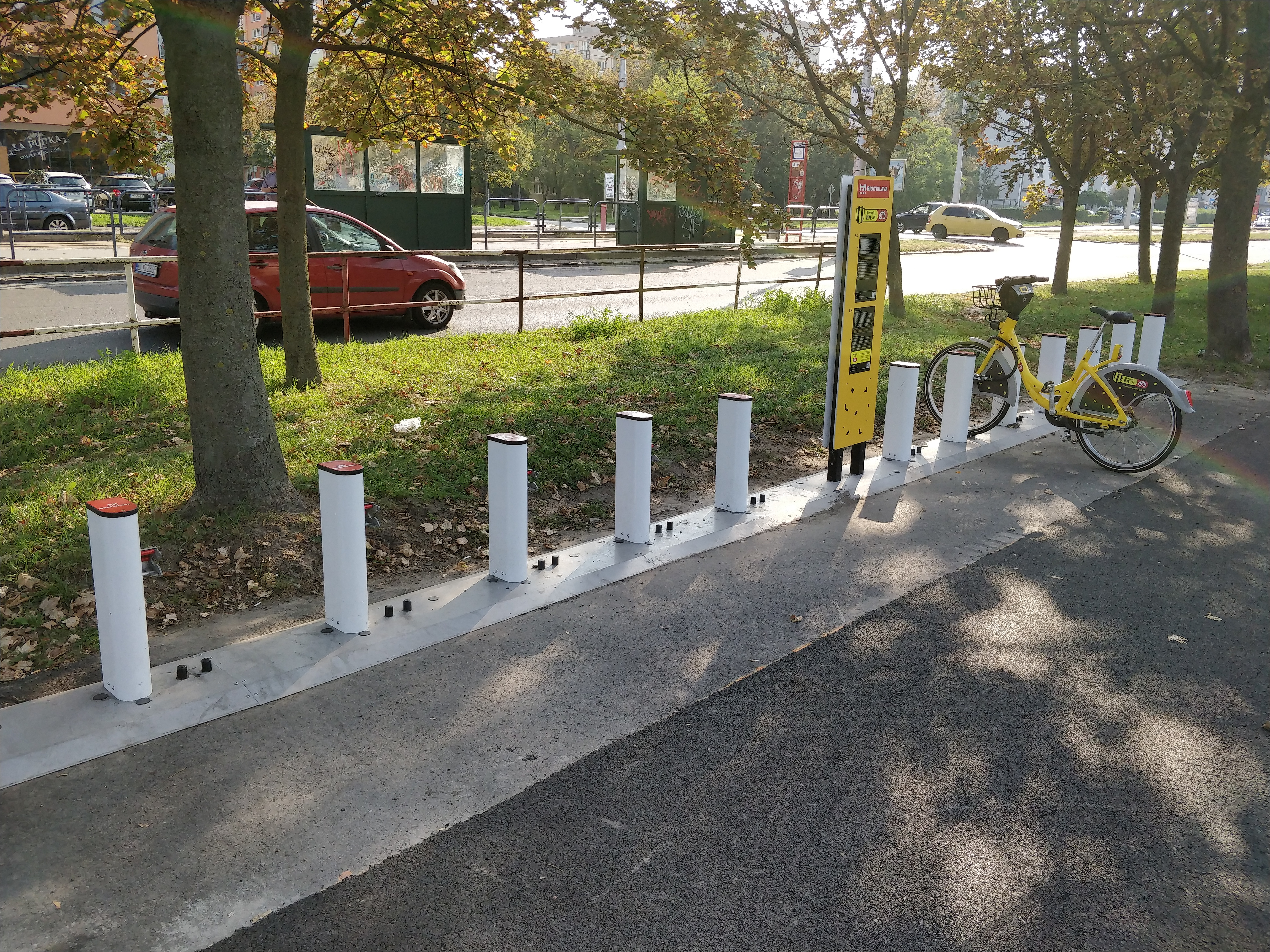 Slovnaft Bajk docking station Astronomická, Bratislava